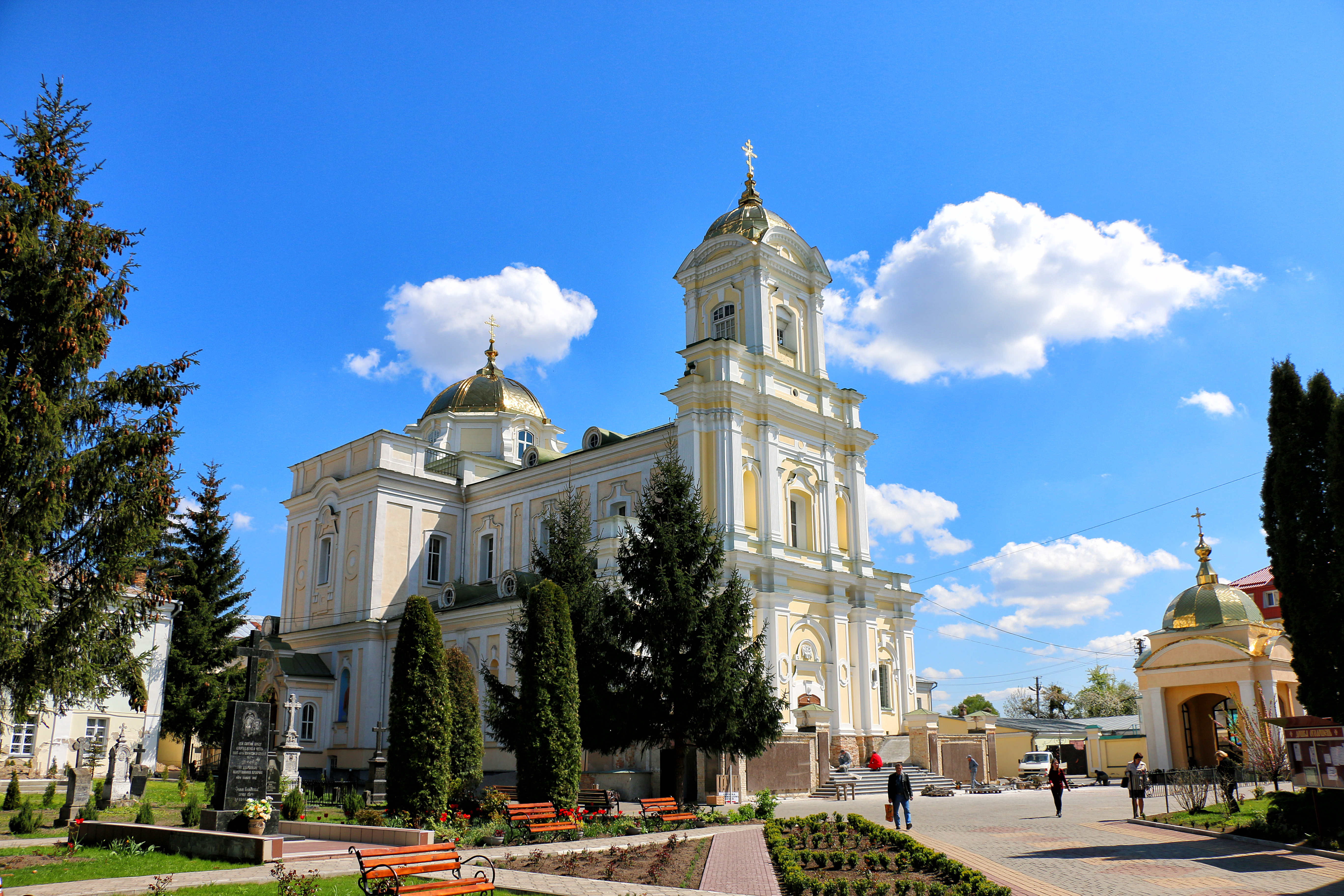 Костел монастиря бернардинів (Троїцький кафедральний собор)(мур.), Луцьк, вул. Л. Українки, 60